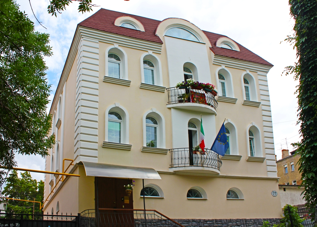 Почётное консульство Италии в Самаре, ул Степана Разина, 71-а